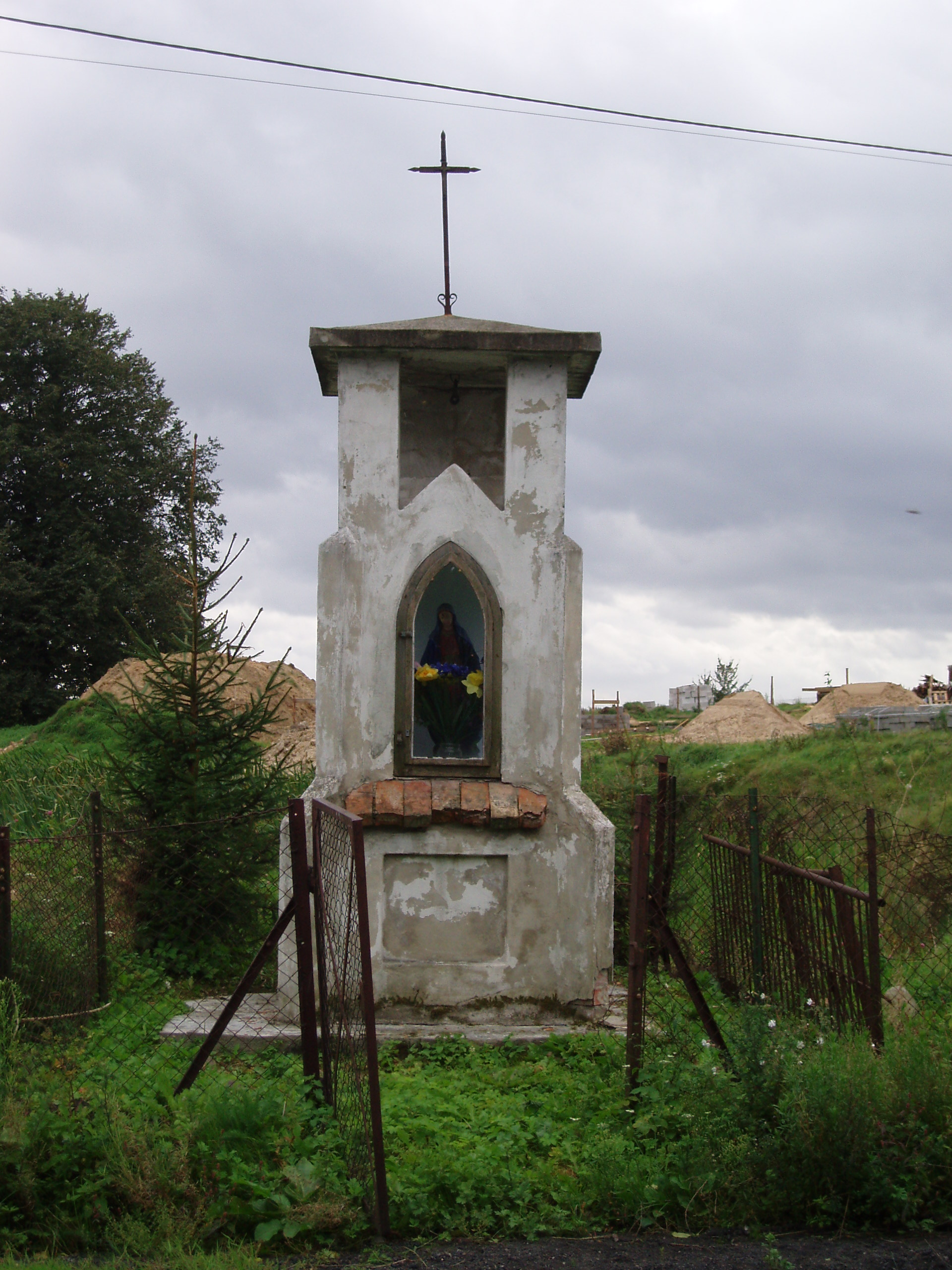 Kapliczka w Trękusie, Usytuowana na prywatnym terenie przy wyjeździe w kierunku Linowa. Kapliczka otynkowana, z daszkiem namiotowym płaskim zwieńczonym krzyżem. W narożnikach przypory. W korpusie ostrołukowe, zamknięte nisze, powyżej nich prześwit.